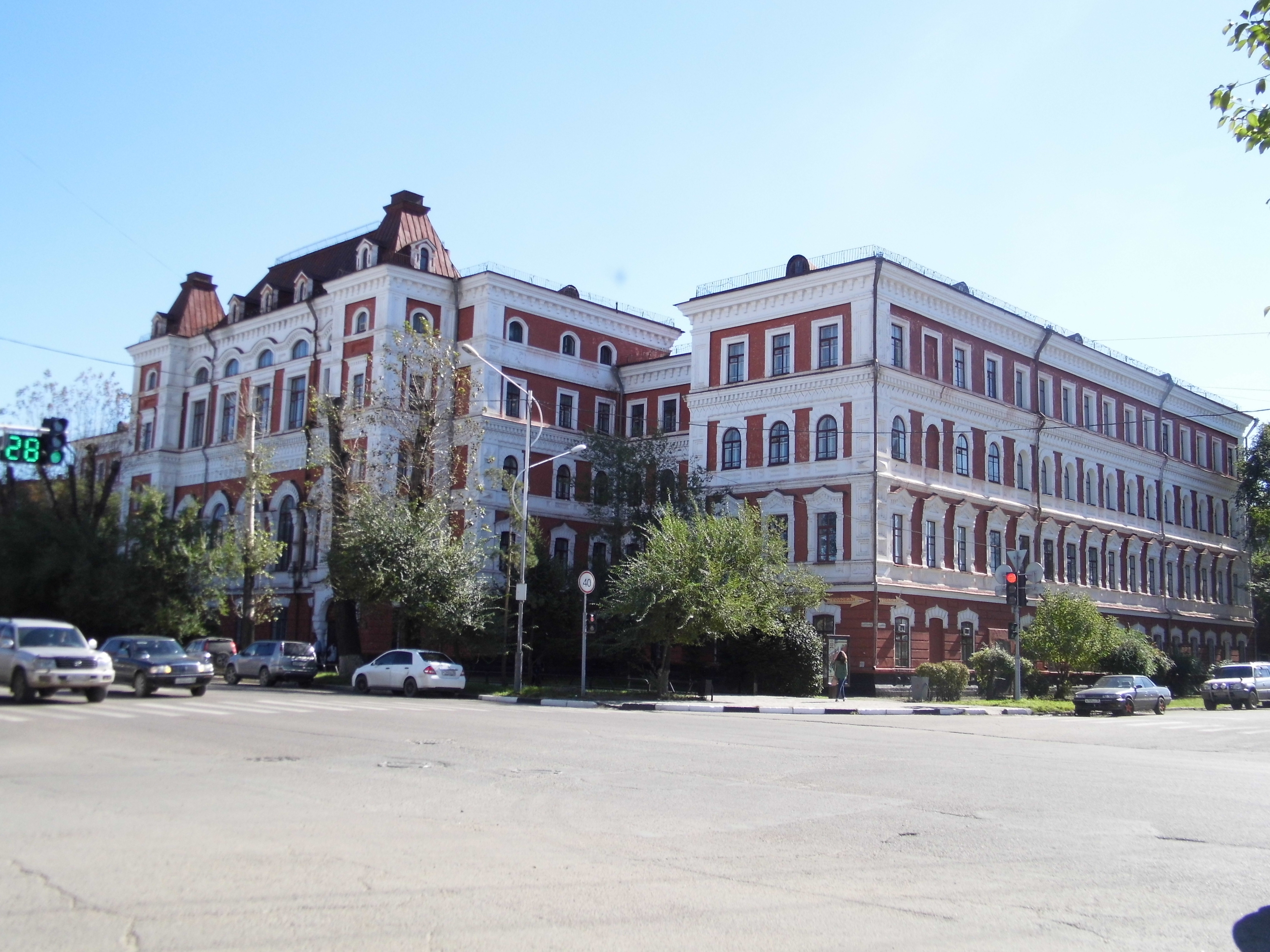 (Амурская область, Благовещенск, ленина улица, 104). Ныне Благовещенский государственный педагогический университет,ранее Мужская гимназия.Архитектор:Э.И.Шеффер. Построена в 1912 г. В 1920-е гг. в здании размещались губернская совпартшкола первой ступени им.Ленина,с 1930-х гг.-Благовещенский государственный педагогический институт.После пожара 1960 г. был достроен четвертый этаж.